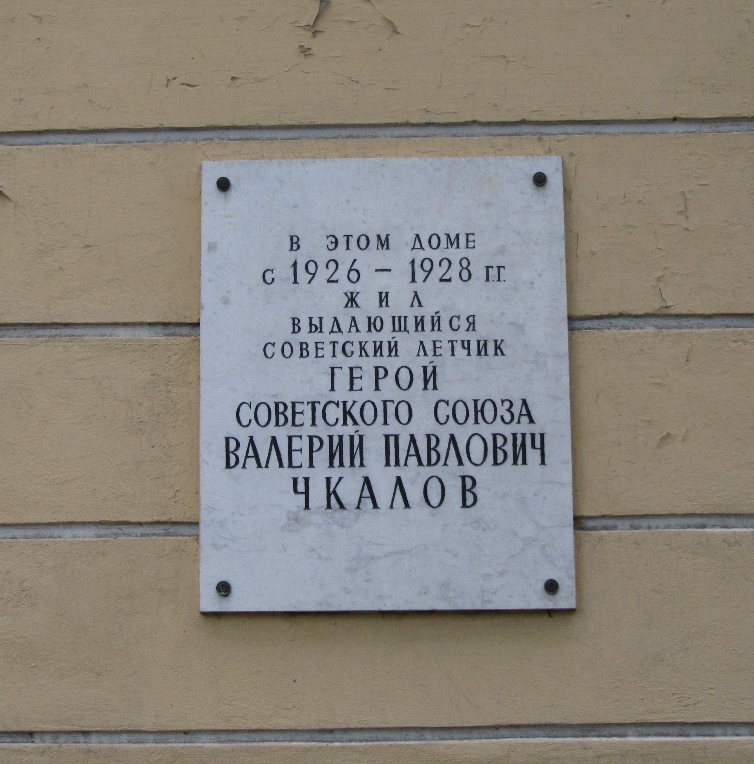 Мемориальная доска Чкалова